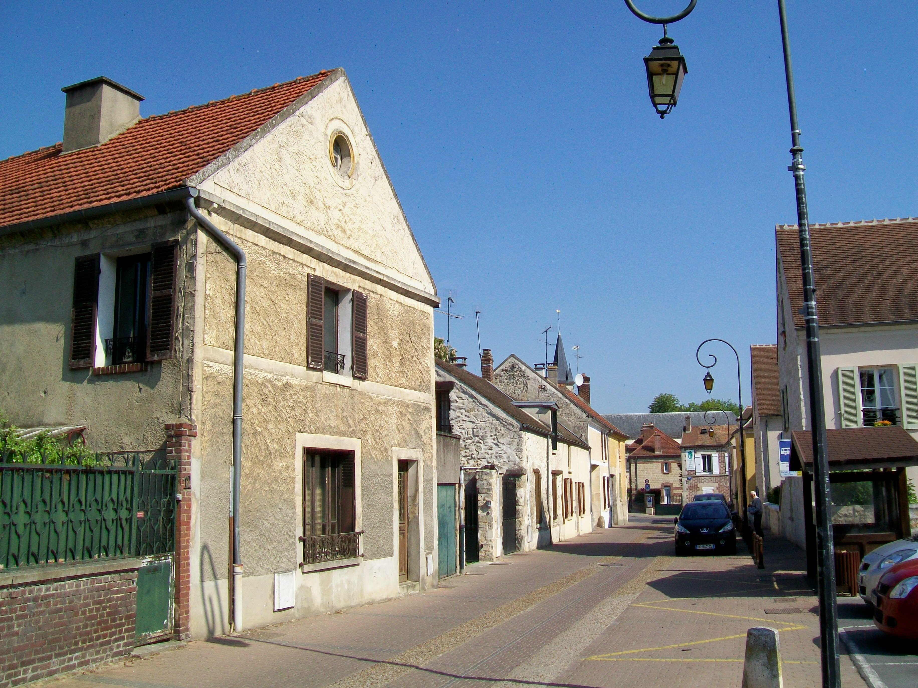 La rue d'Hérivaux, au centre du village ancien, vue en direction sud-nord. Cette rue continue jusqu'au poteau des Ecouteurs à la limite de la forêt de Coye. S'y trouvent également le centre culturel, le marché couvert, le cimetière ancien et les stades.